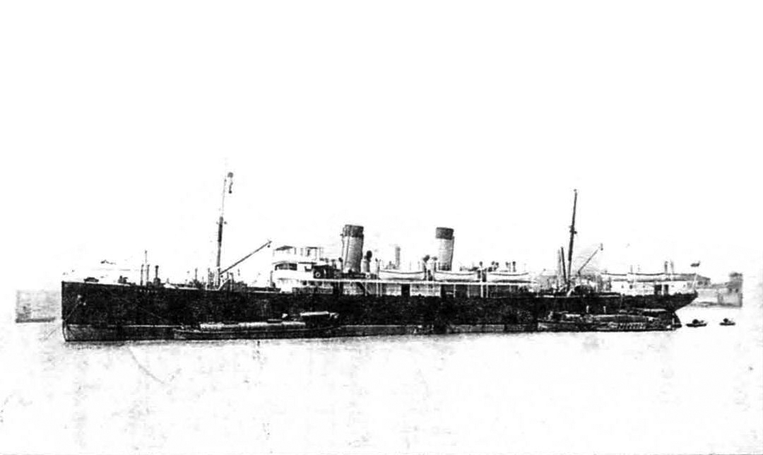 Вспомогательный крейсер «Орел»